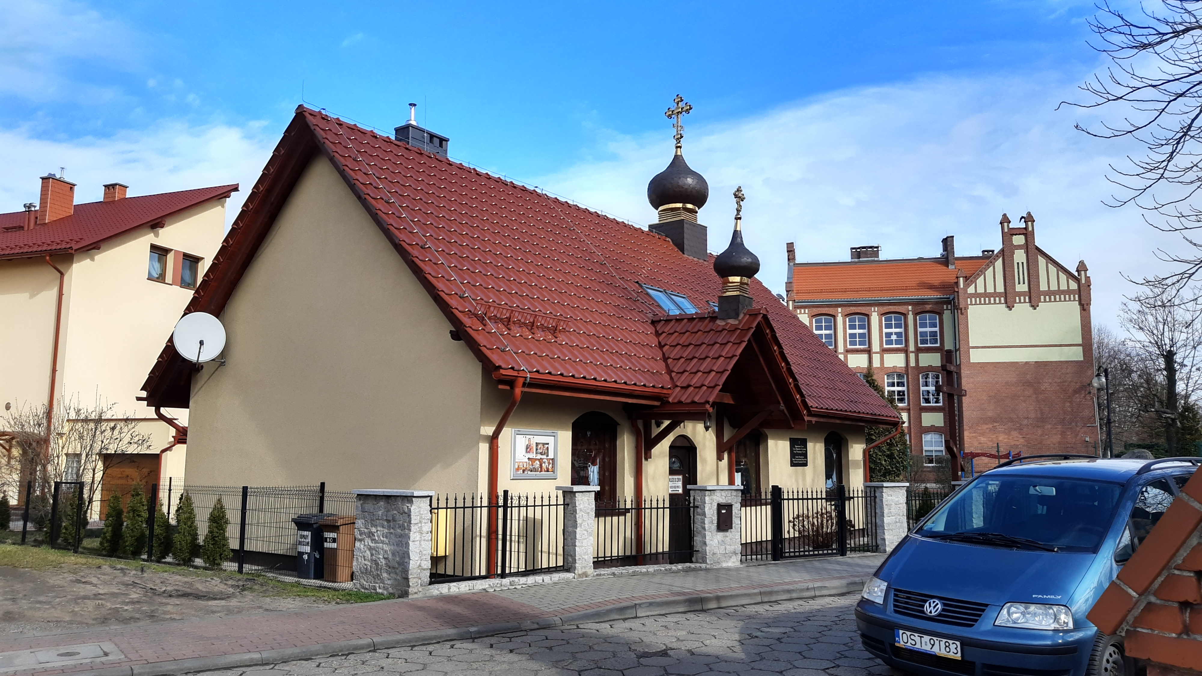 Kędzierzyn-Koźle - cerkiew prawosławna Ikony Bogurodzicy „Wszystkich Strapionych Radości”